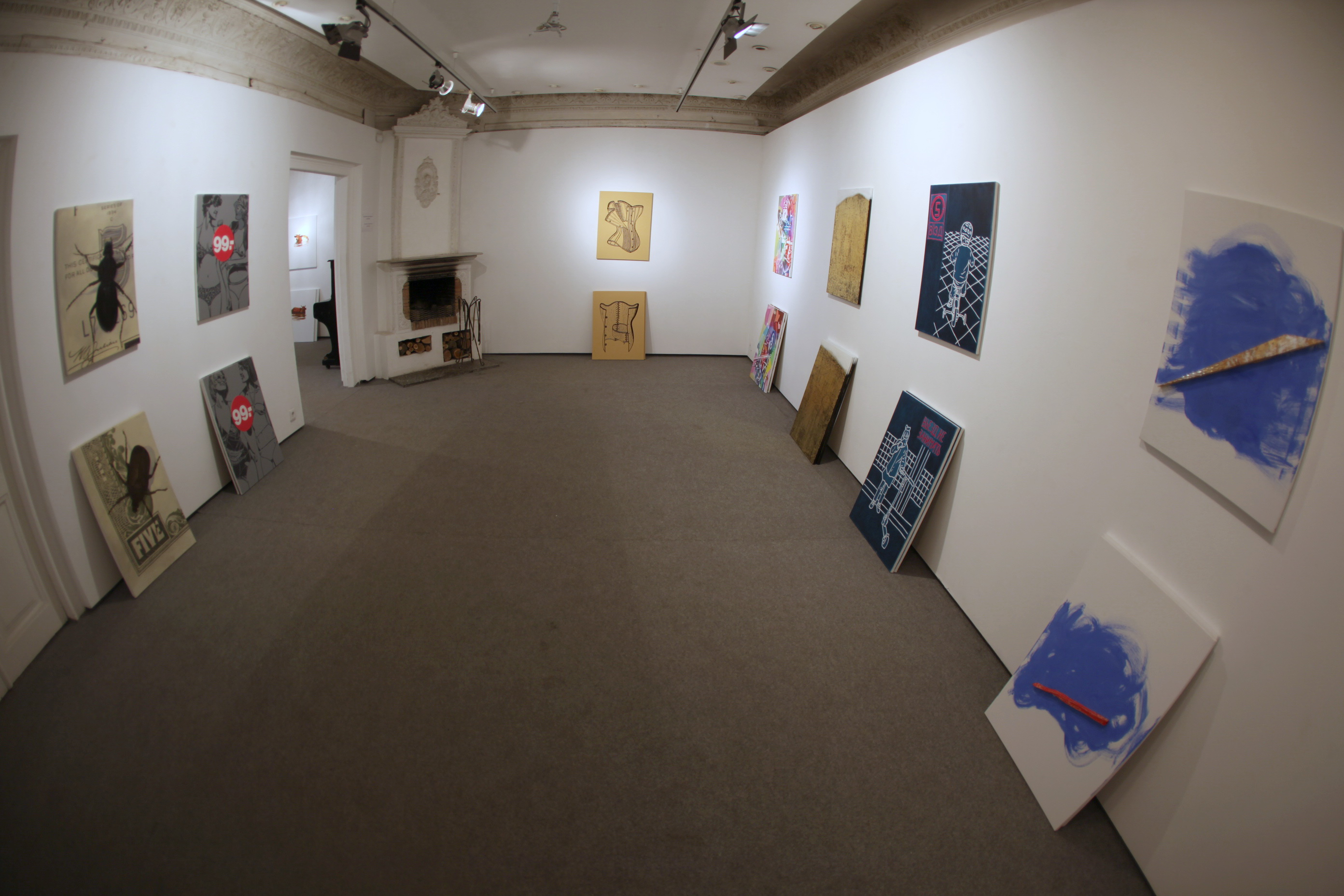 "Арт Спека", 2012